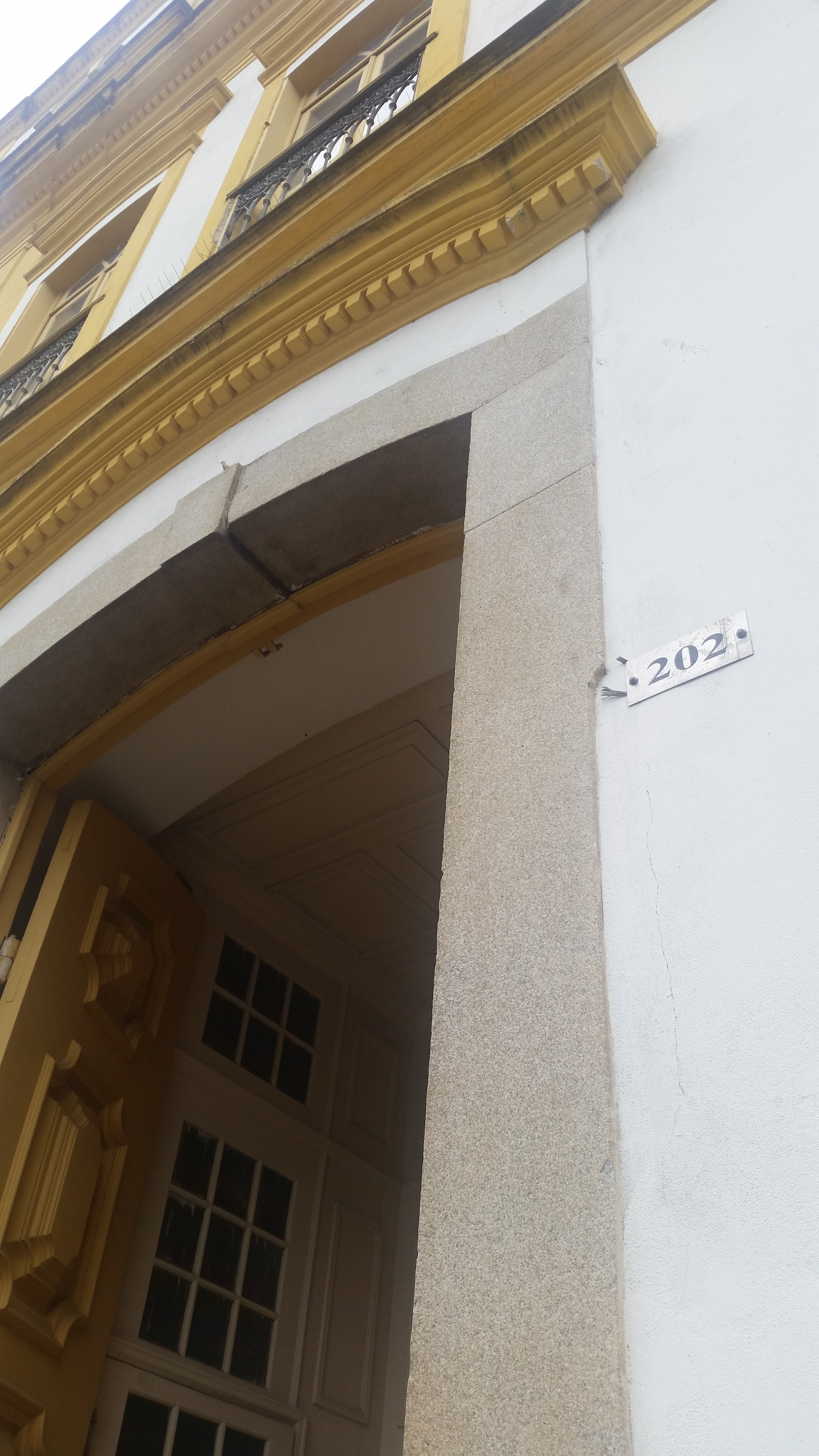 Porta e número (202) da Igreja Nossa Senhora da Boa Morte, São Paulo (SP)